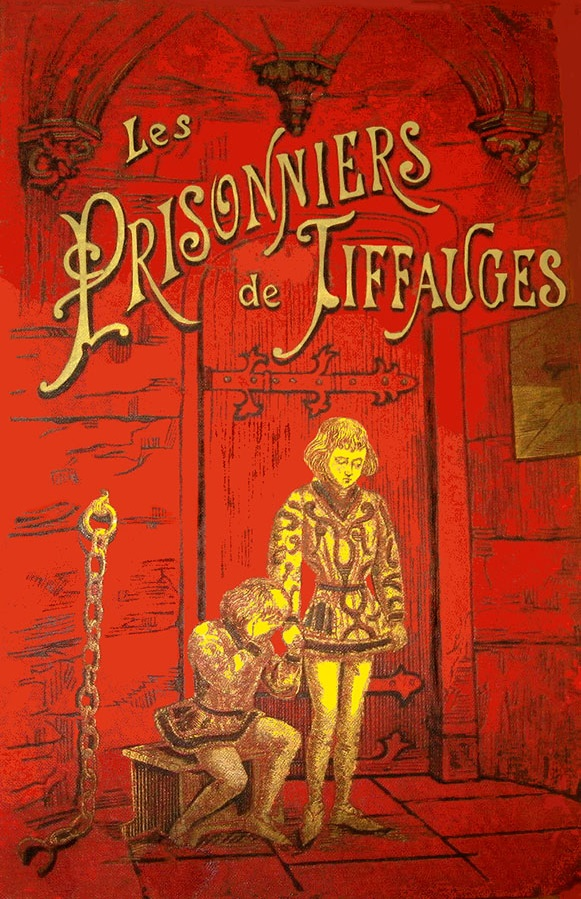 Les Prisonniers de Tiffauges par Mlle Émilie Carpentier. Nouvelle édition illustrée de 14 gravures sur bois et de 18 compositions de E. Mas dont 3 hors texte, gravées par Guillaume. Paris, Librairie d'éducation A. Hatier, s.d. (1892). Couverture illustrée sur le 1er plat, tranches dorées.